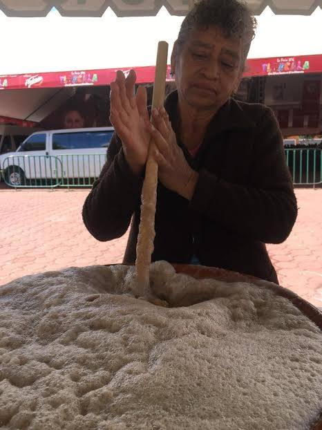 Adrea Romero en 2016